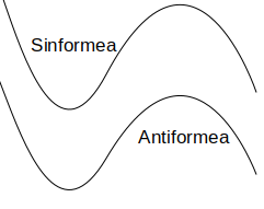 Toles antifrome eta sinfromea